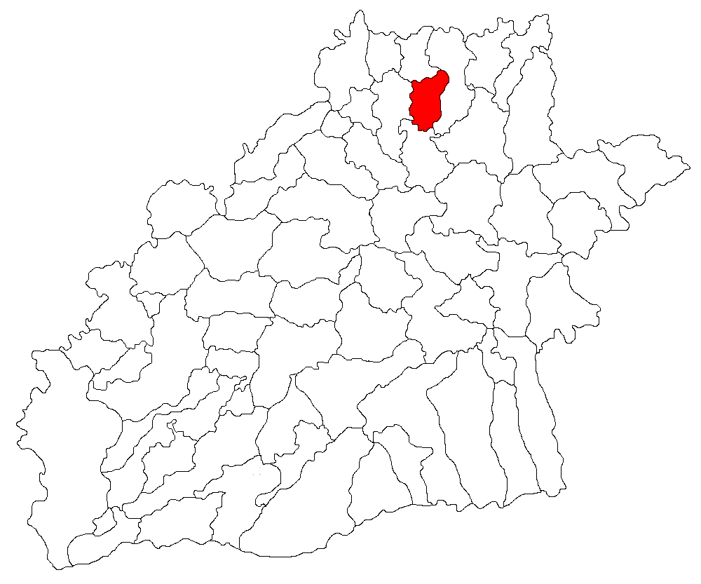 Categorie:Hărţi ale judeţului Sibiu